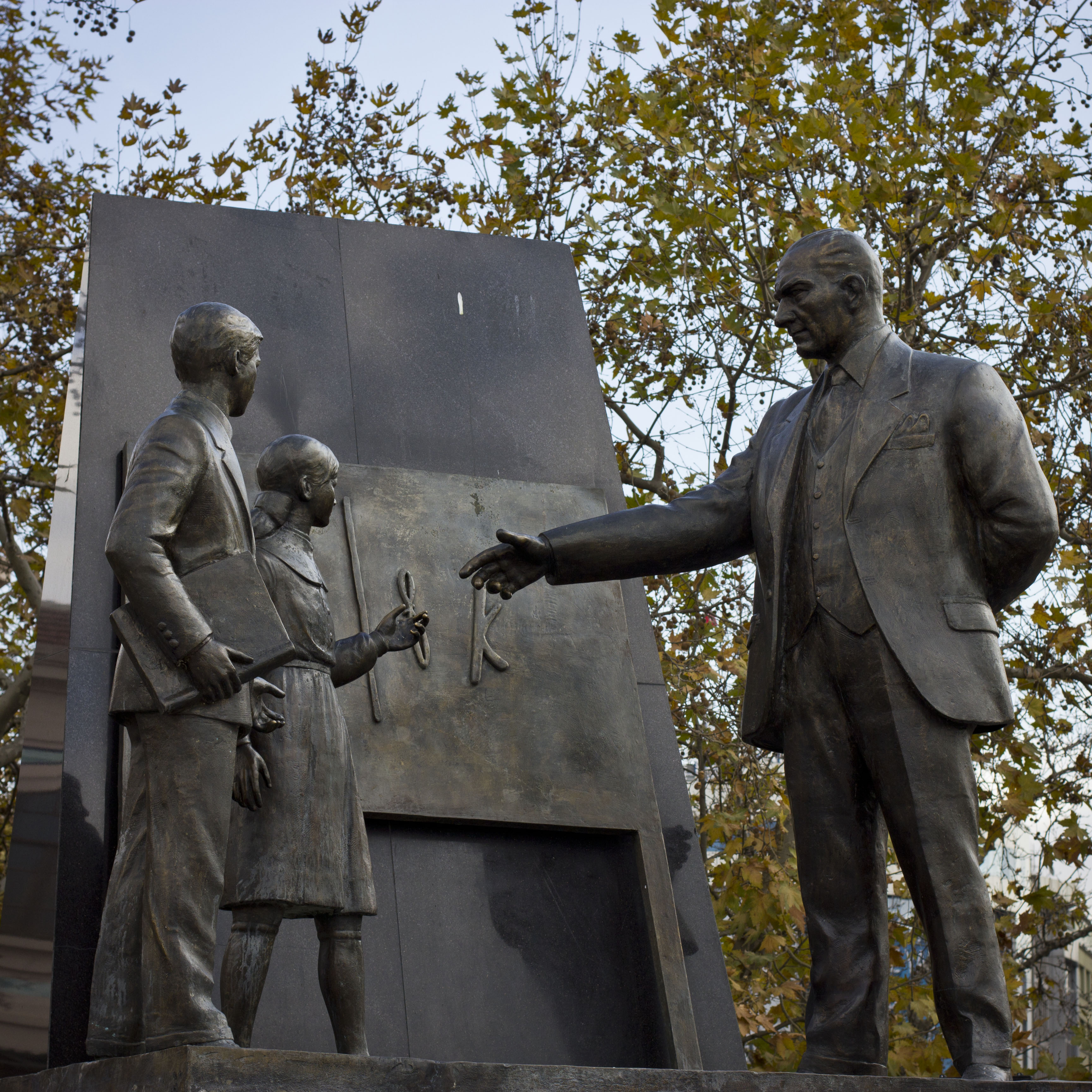 Kadıköy'deki Atatürk anıtı. Başöğretmen Atatürk'ün çocuklara alfabeyi öğretmesi betimleniyor.